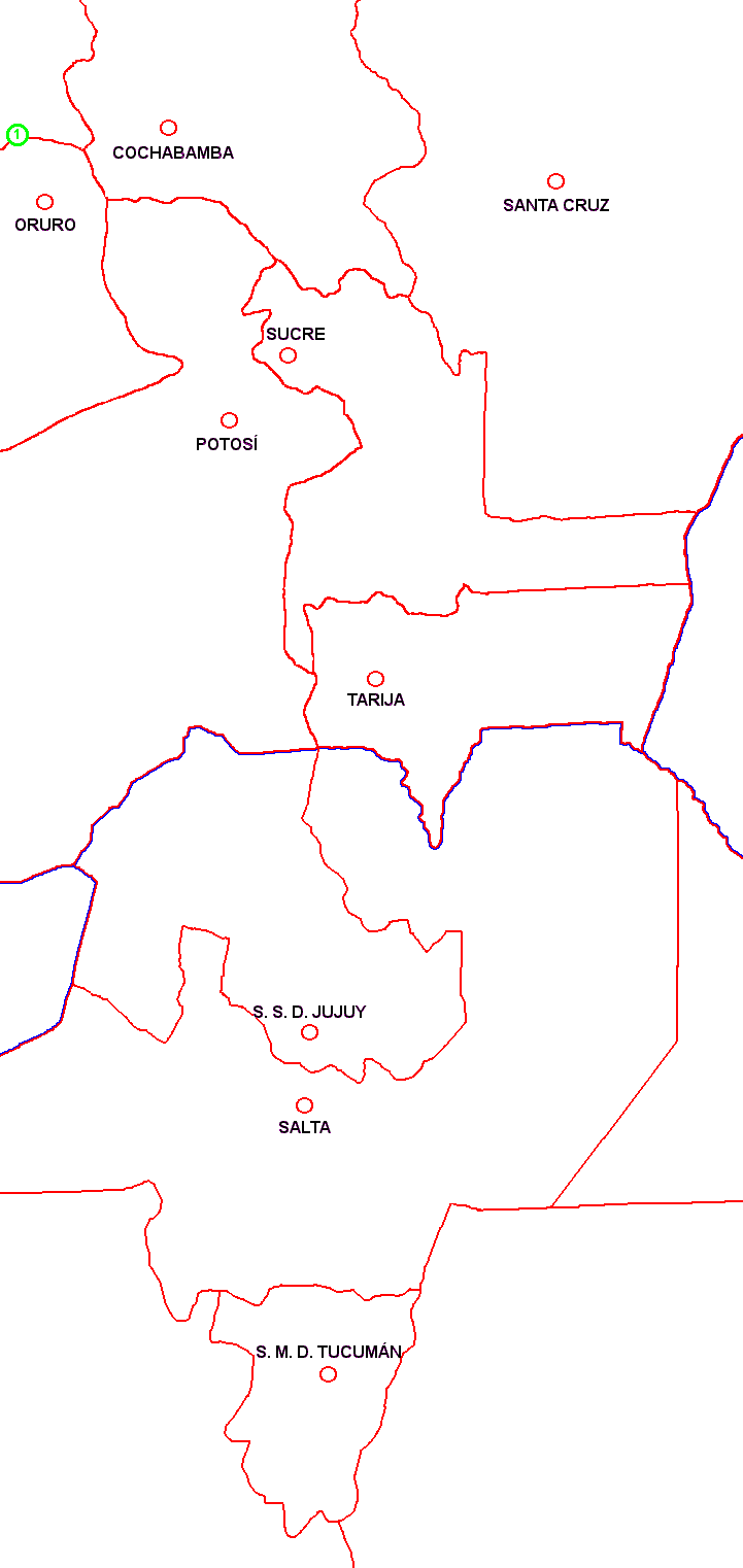 Rebutia steinmannii var. eucaliptana - range map